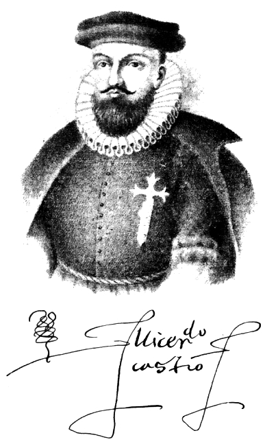 Lope García de Castro, (1516 - 1576) Gobernador y Capitán General del Perú entre 1564 y 1569.